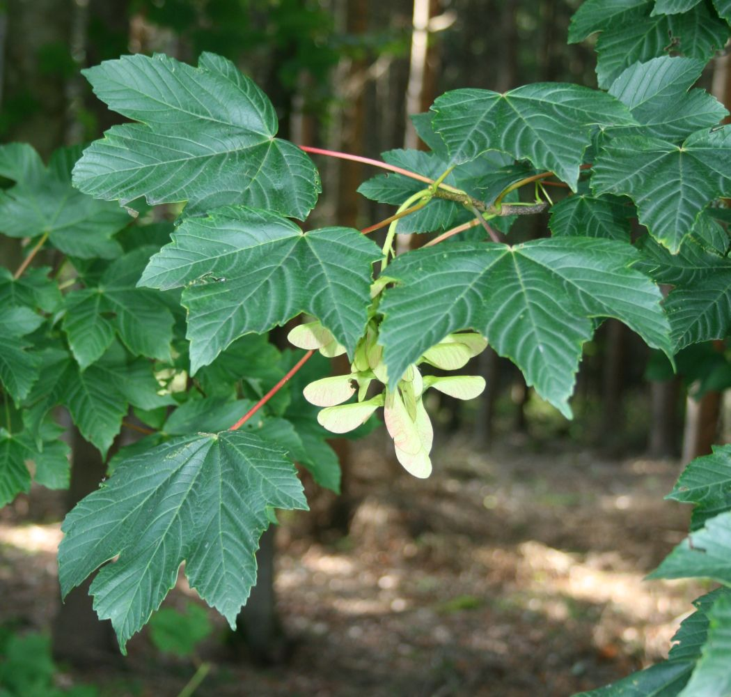 Berg-Ahorn (Acer pseudoplatanus), Seifenbaumgewächse (Sapindaceae) - Österreich/Austria/Autriche: Oberösterreich, Hausruckviertel, Kien NW Attnang-Puchheim